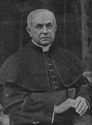 Jan Nepomuk Říhánek (1863 - 1935), Český římskokatolický kněz.